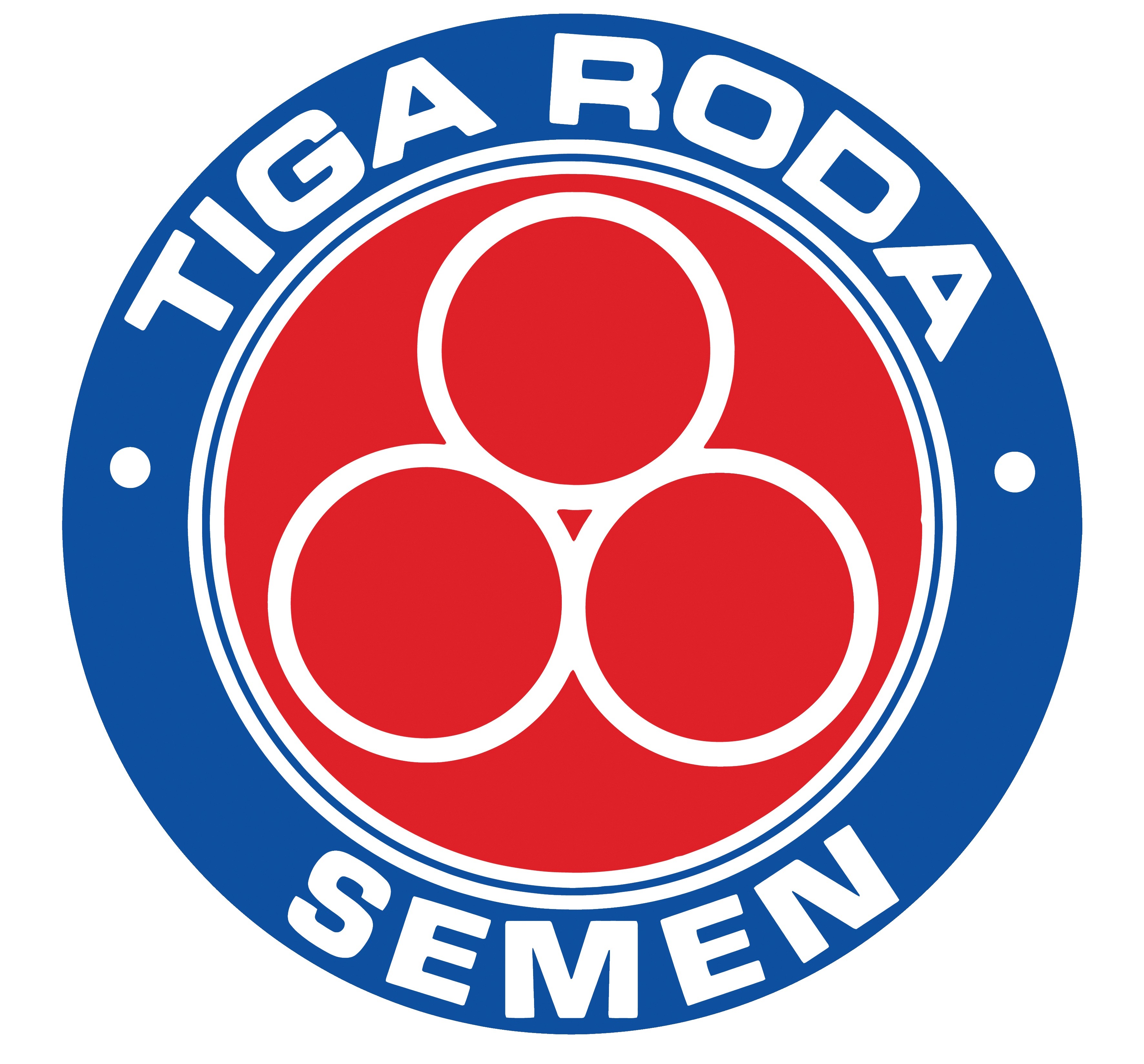 Logo dari merek Semen Tiga Roda, semen yang diproduksi oleh PT Indocement Tunggal Prakarsa Tbk.